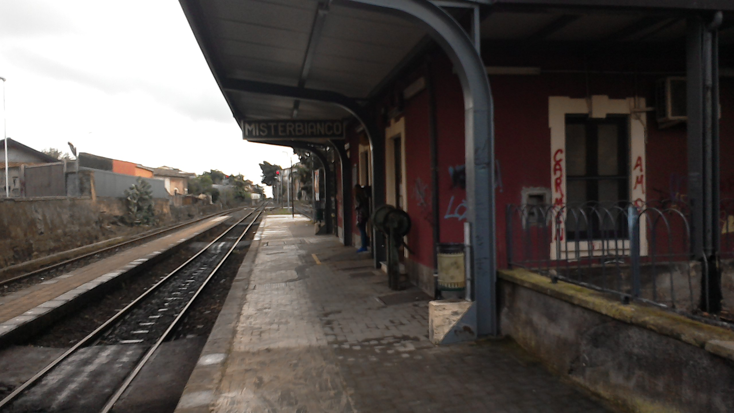 Marciapiede interno della stazione della Ferrovia Circumetnea di Misterbianco